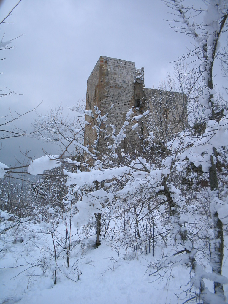 chateau de Puivert.